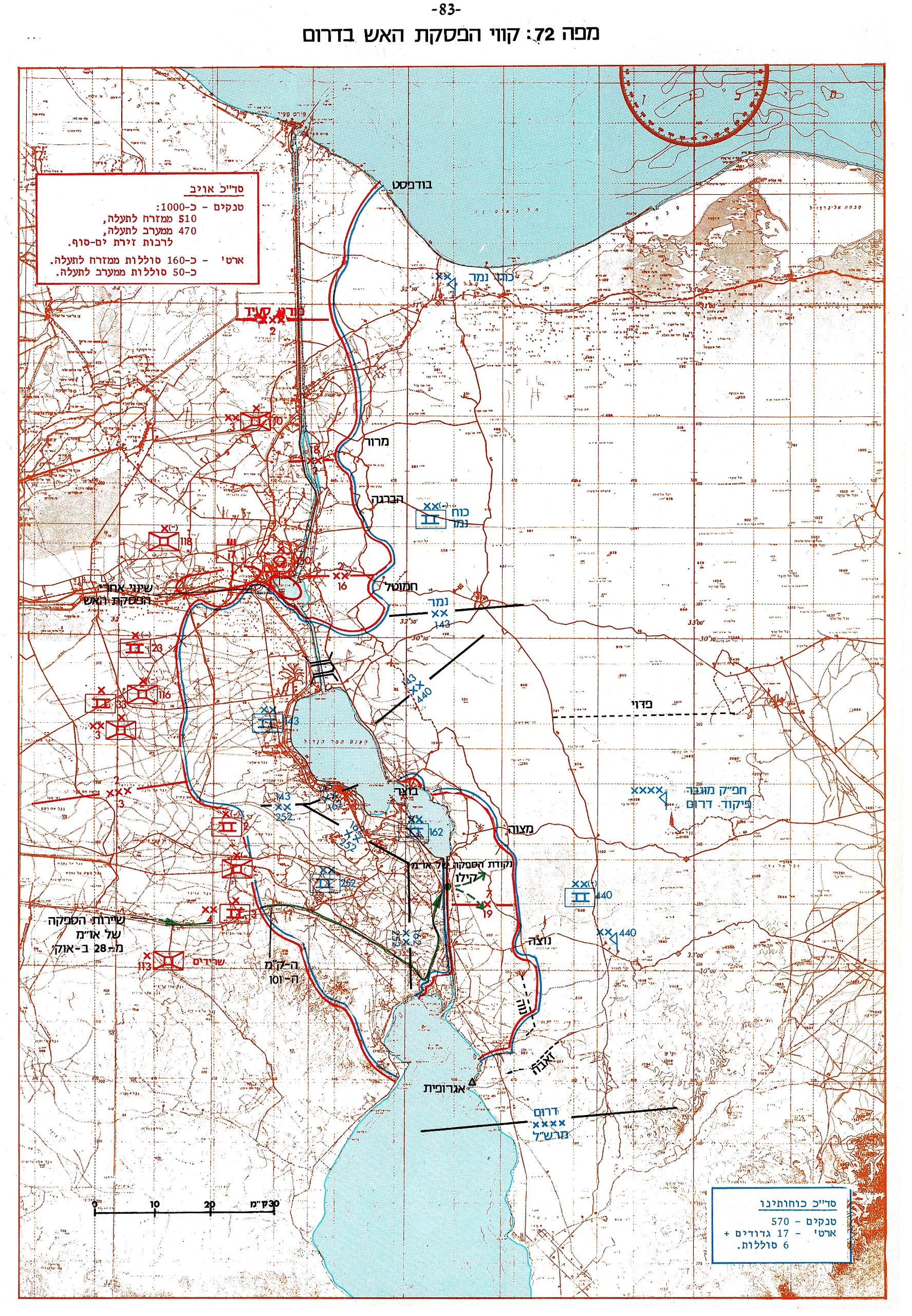 אטלס מלחמת יום הכיפורים. מפה 72 - קווי הפסקת האש בדרום - מלחמת יום הכיפורים